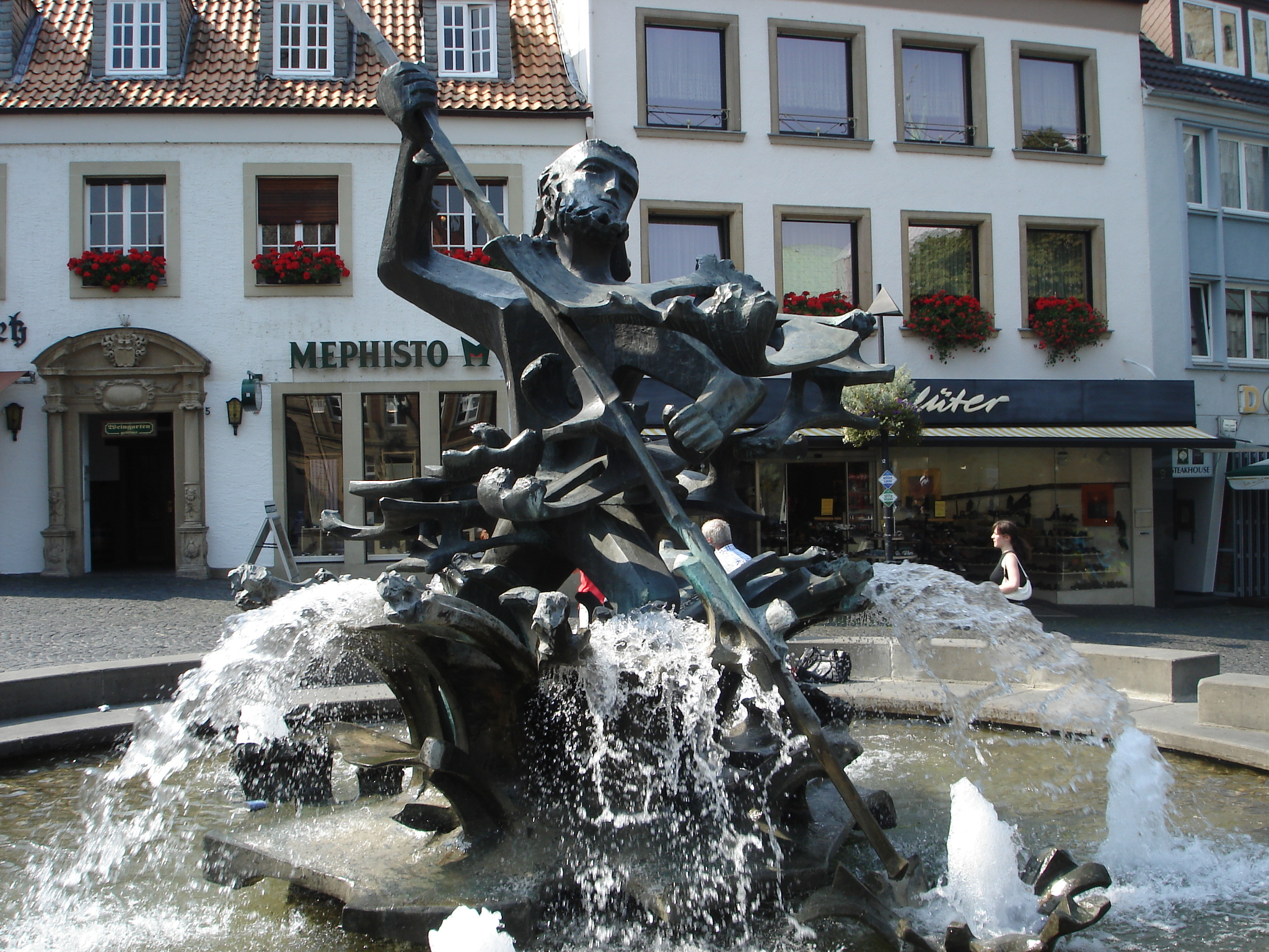 Neptun-Brunnen vor dem Paderborner Dom von Josef Rikus